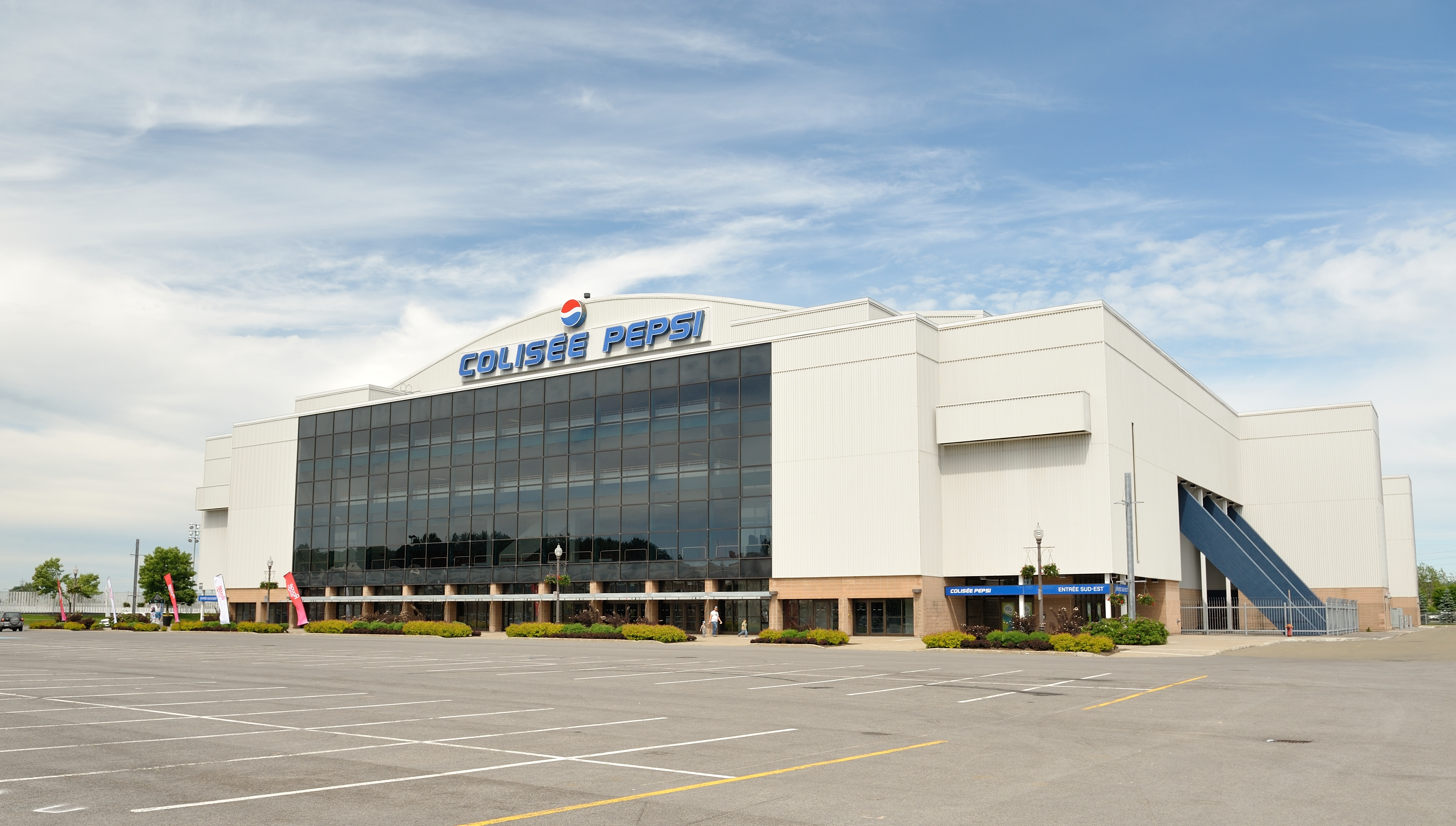 Situé sur le terrain d'Expo-Cité dans le quartier Limoilou, le Colisée Pepsi est le haut lieu du hockey dans la Capitale Québécoise. Inauguré en 1949, il est le 5ième aréna majeur construit au Québec.